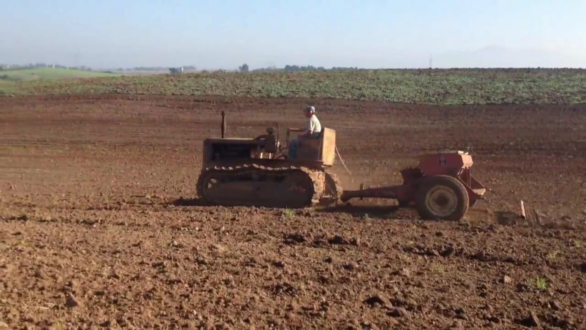 Work in the nature